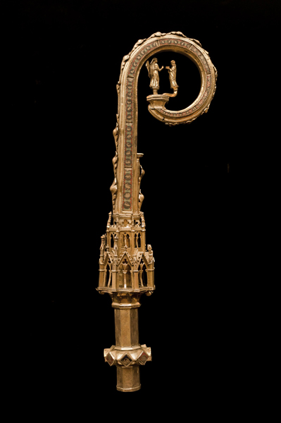 Báculo del Papa Luna (Baja Edad Media). Número de inventario: 52160.